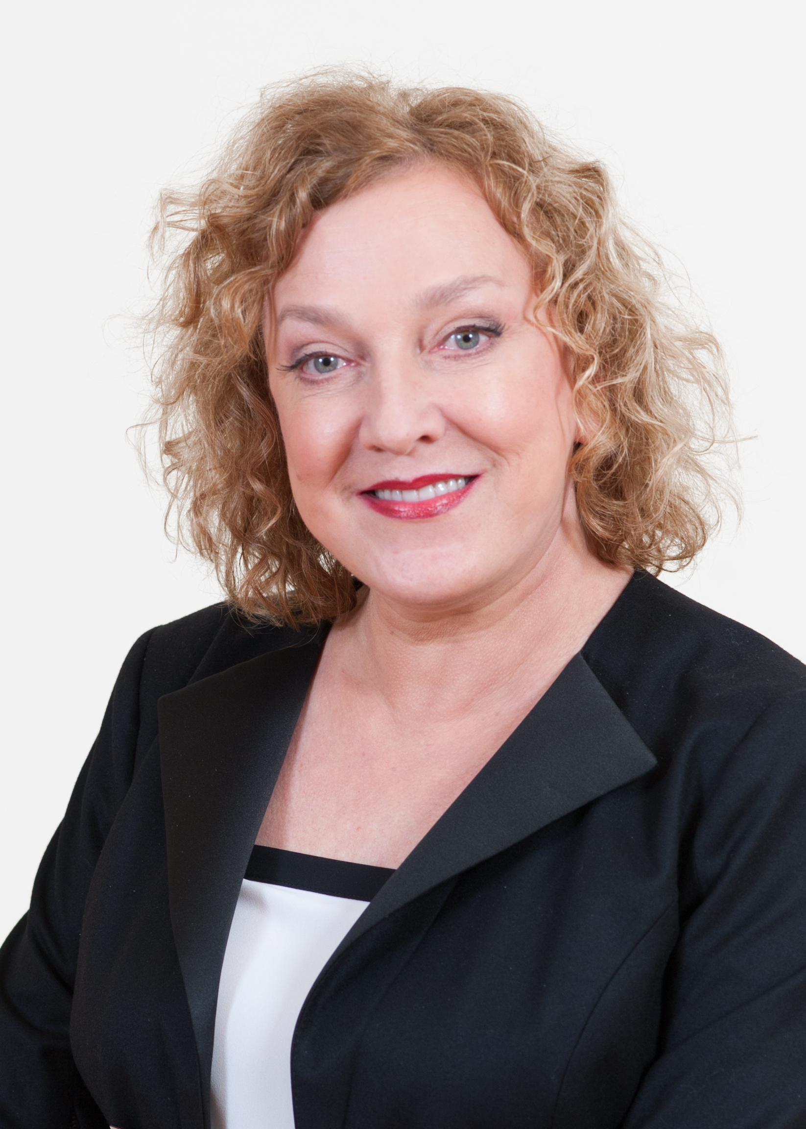 Maire Aunaste